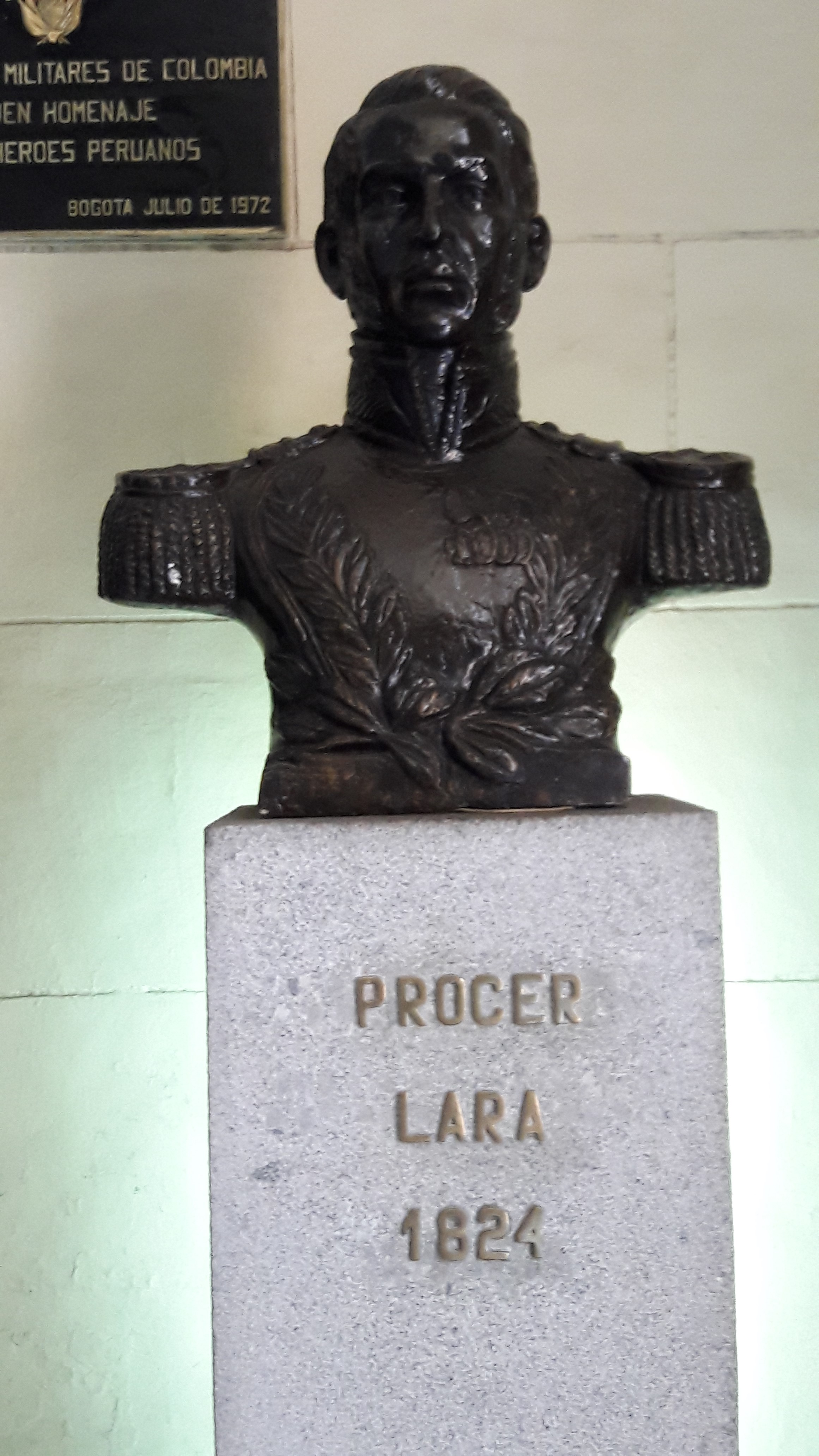 Prócer Lara 1824